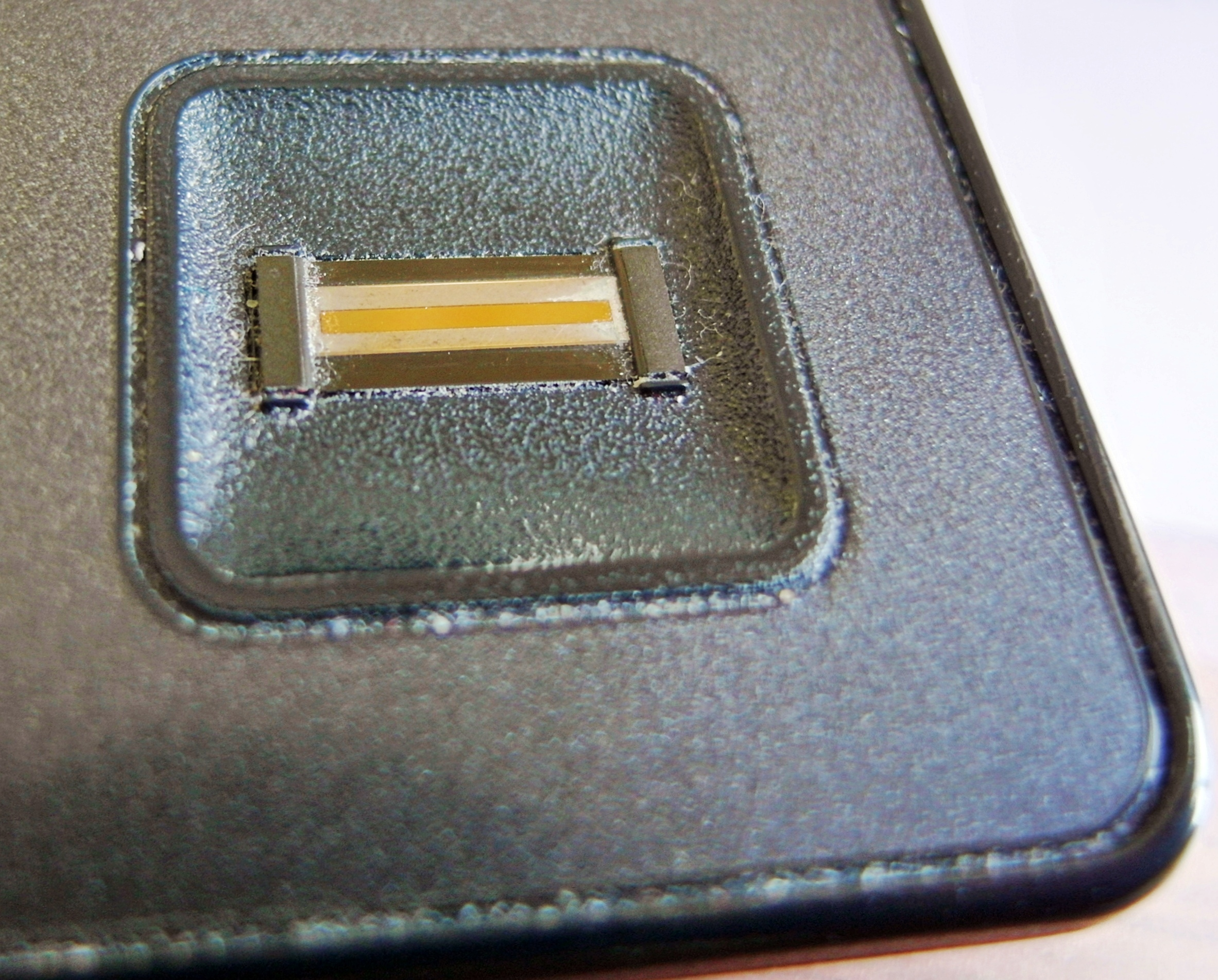 Fingerabdruck-Sensor an einem HP-Laptop